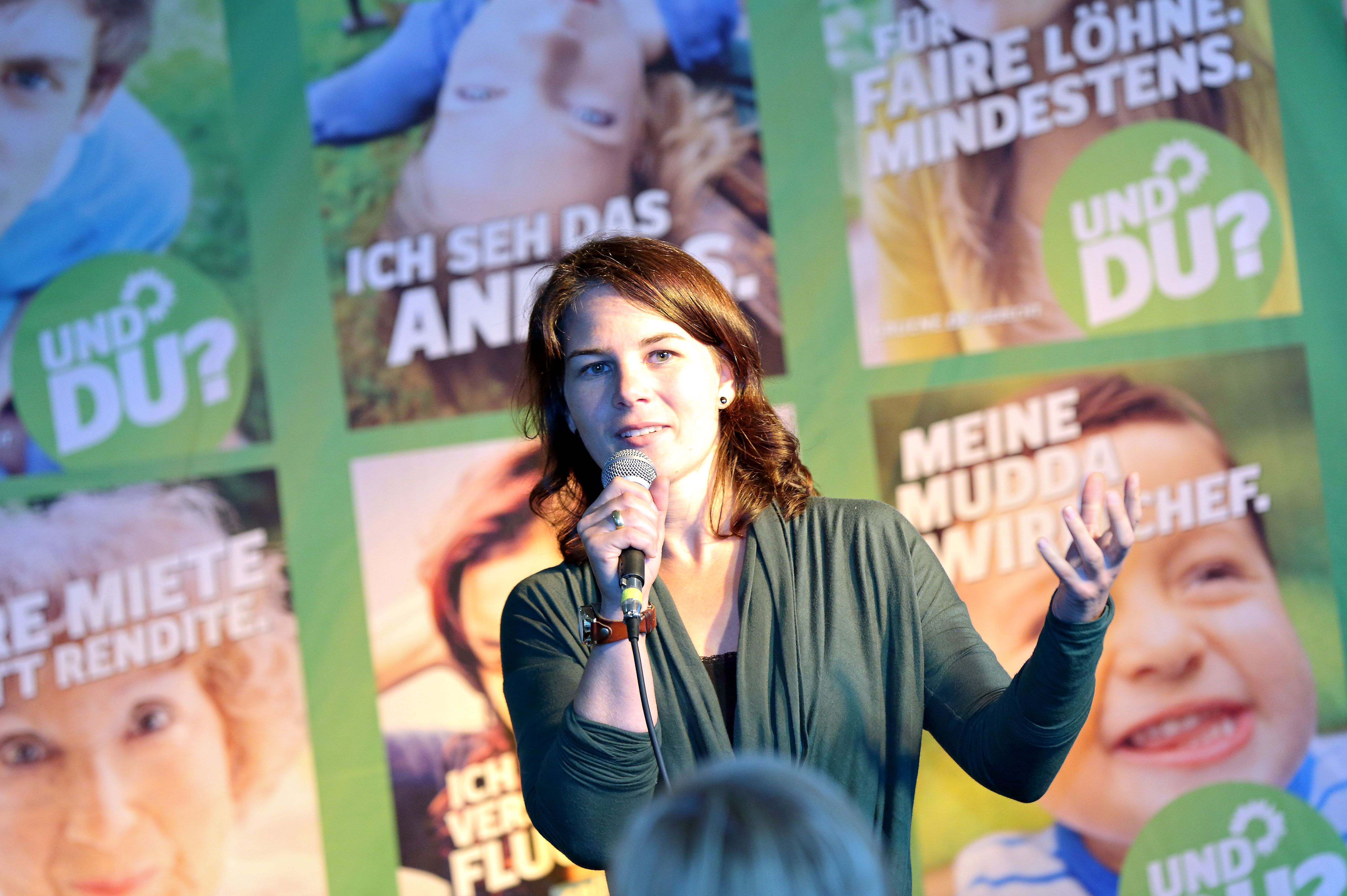 Annalena Baerbock (* 15. Dezember 1980 in Hannover) ist eine deutsche Politikerin der Grünen und Bundestagsabgeordnete. Sie ist Mitglied des Parteirats von Bündnis 90/Die Grünen und war von 2009 bis 2013 Vorsitzende des Landesverbands Brandenburg.